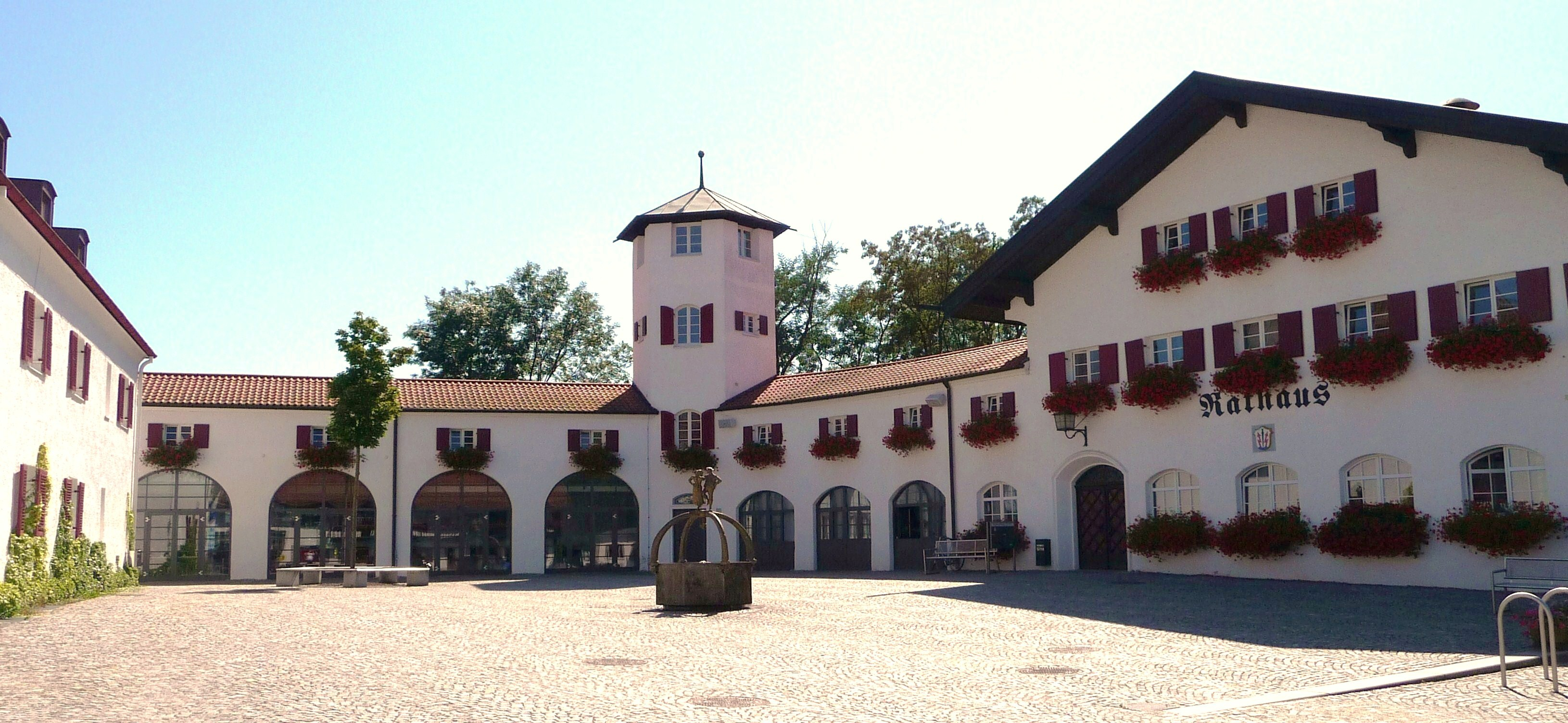 Der Rathausplatz mit dem Hochzeitsbrunnen in Töging am Inn